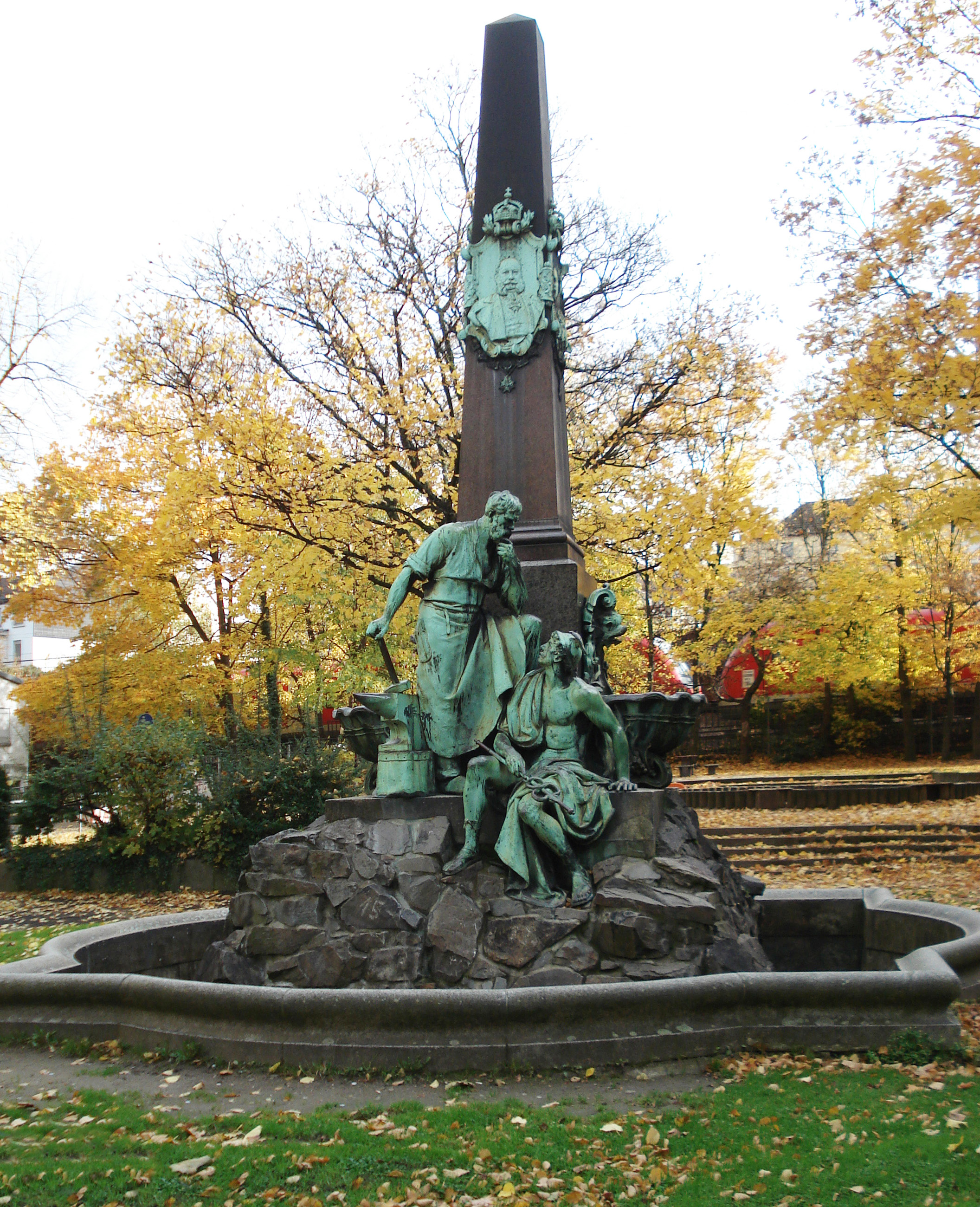 Drei-Kaiser-Brunnen auf dem Bodelschwingh-Platz in Wehringhausen, Bronzeskulpturen eines Schmieds und des Götterboten Merkur, darüber Abbildung von Wilhelm I.